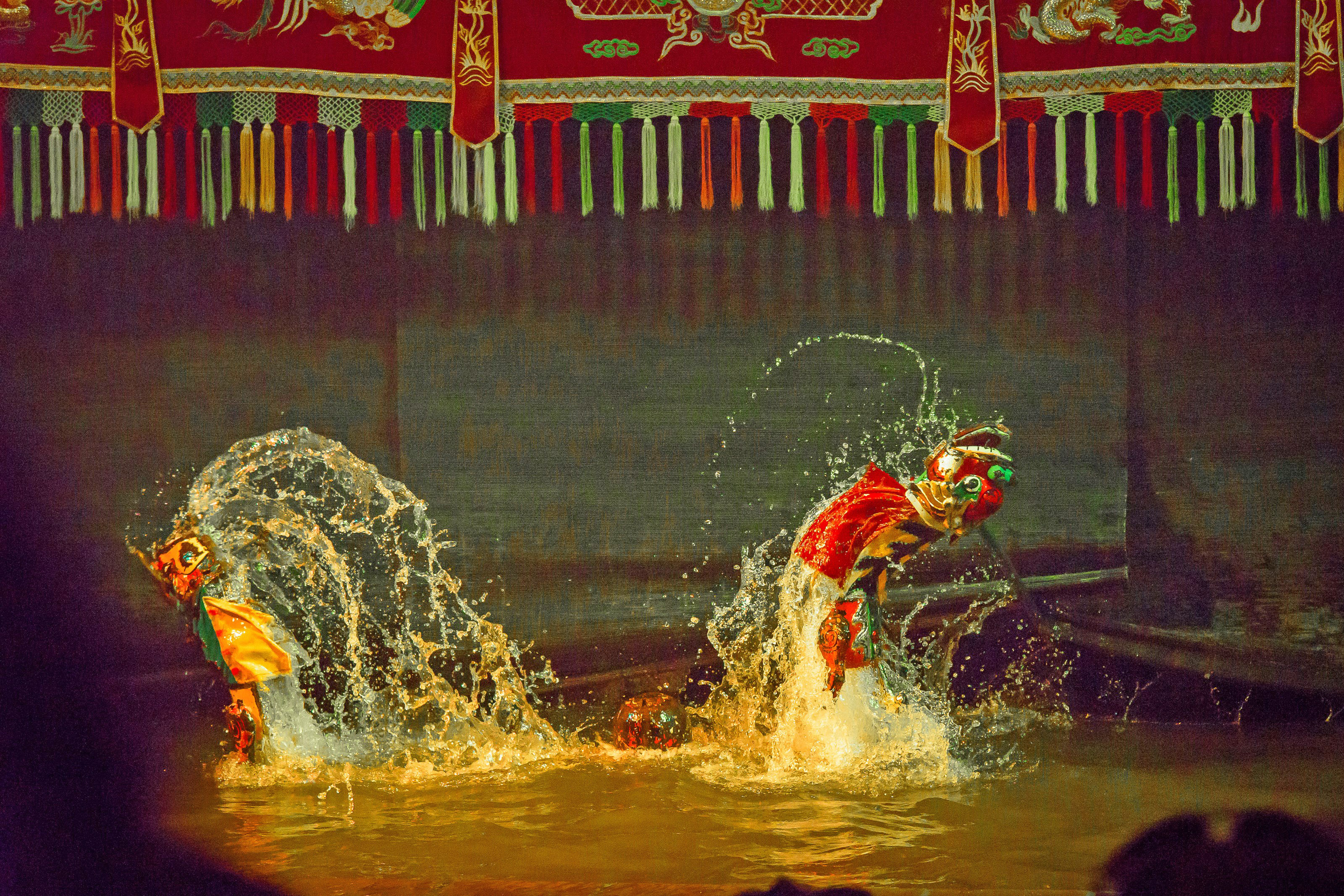 Spectacle de marionnettes sur l'eau